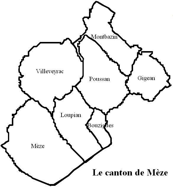 Le Canton de Mèze Image personnelle